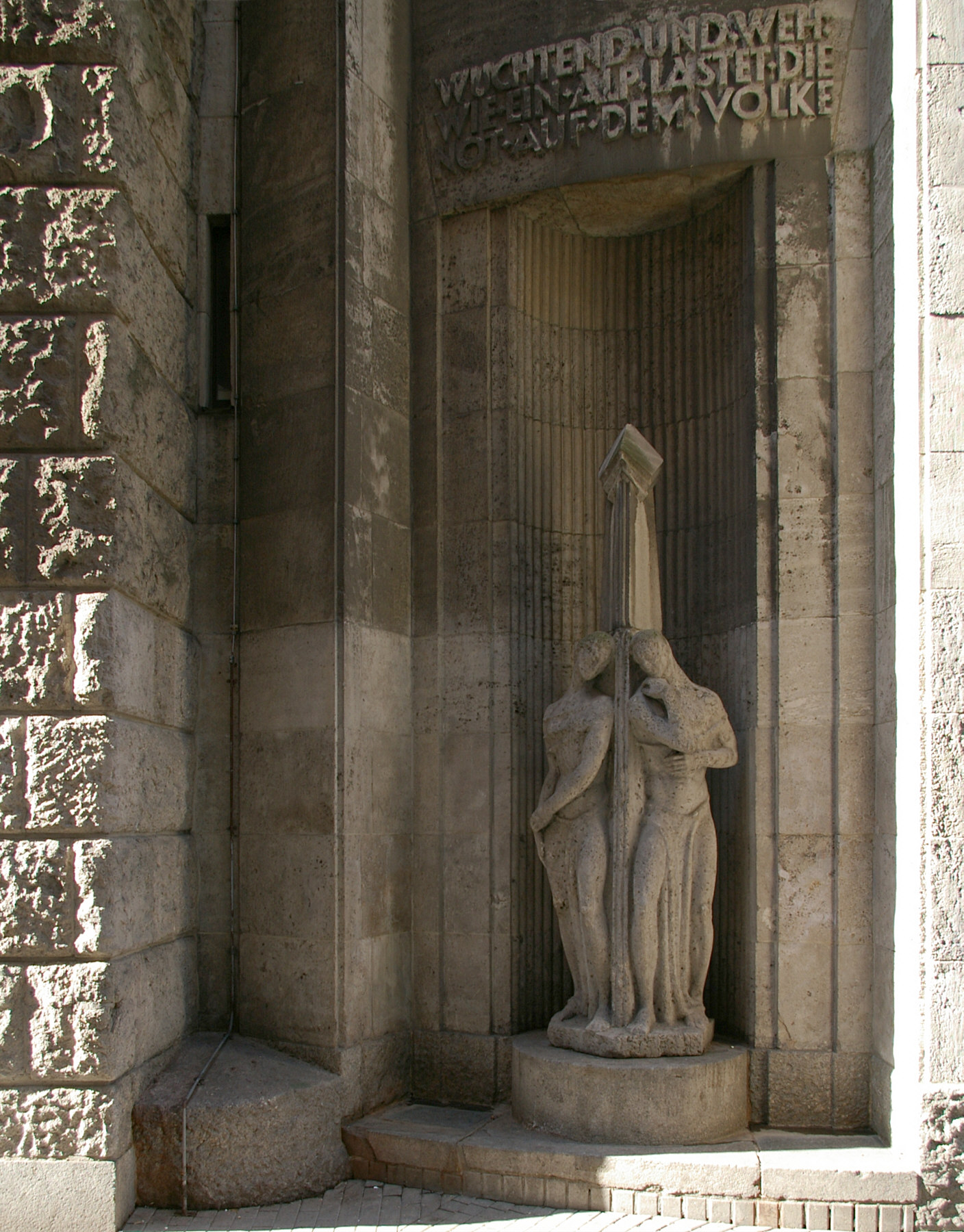 Museum für Kunst- und Kulturgeschichte Dortmund, "WUCHTEND UND WEH: WIE EIN ALP LASTET DIE NOT AUF DEM VOLKE"